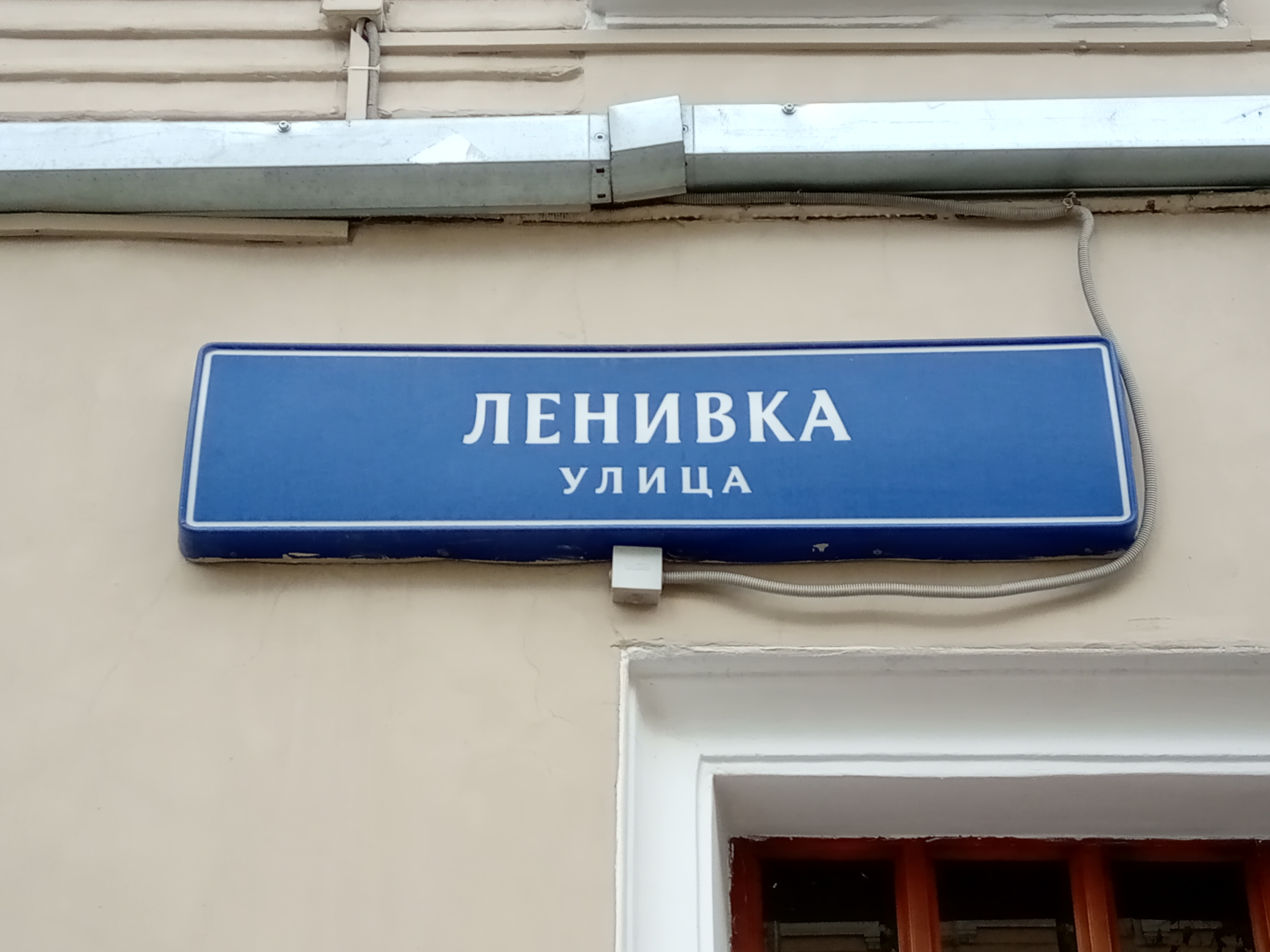 Ленивка